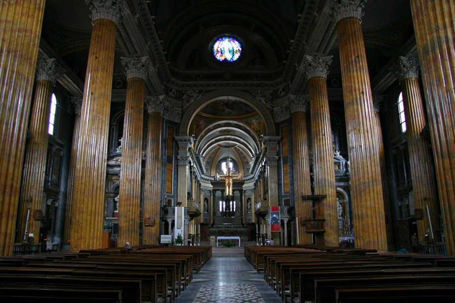 Interno del Duomo di Novara